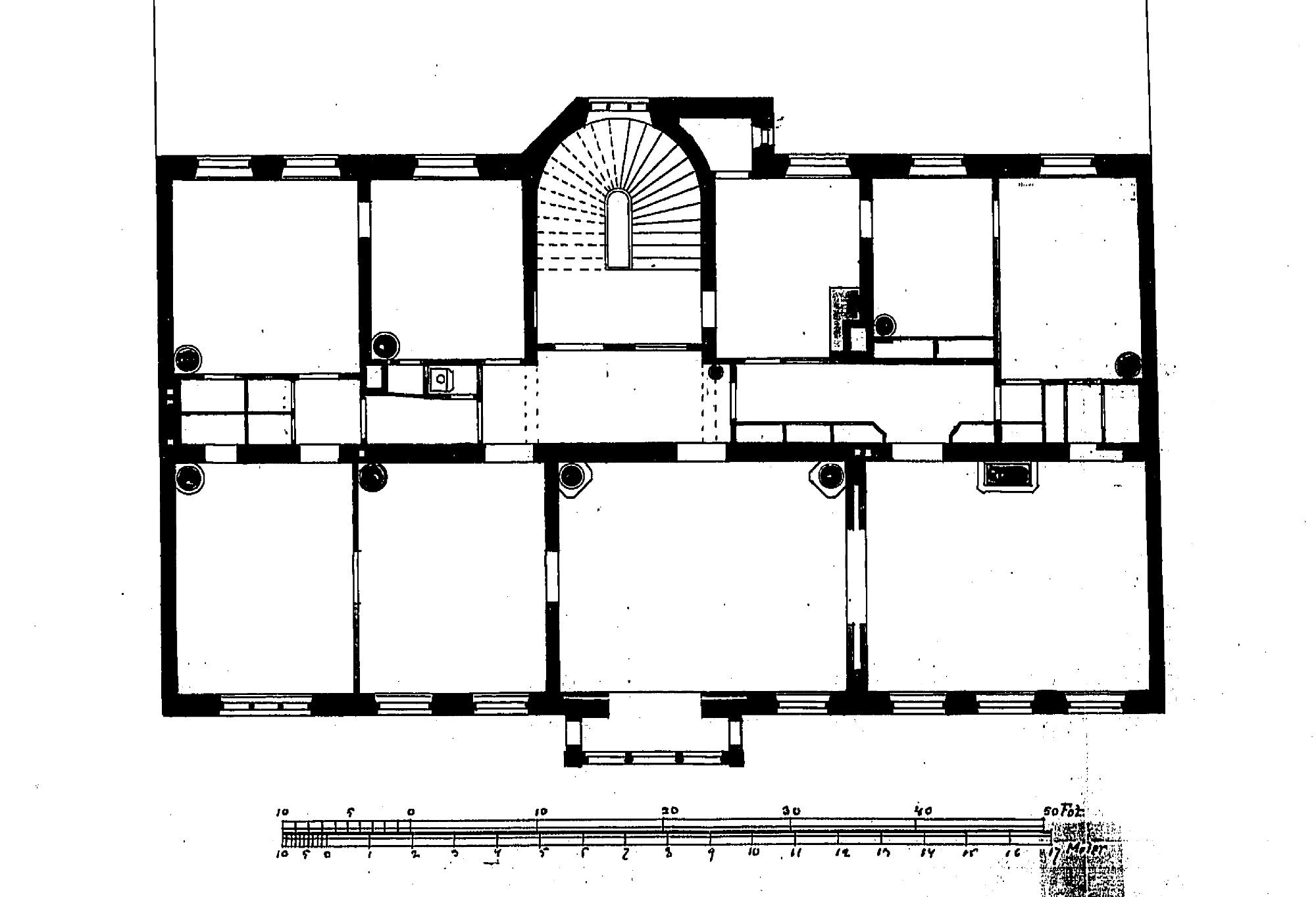 Pagen 14 våning 2 trappor